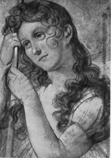 Amelie Wolff-Malcomi als "Jungfrau von Orleans", Kreidezeichnung, Landesbibliothek Weimar